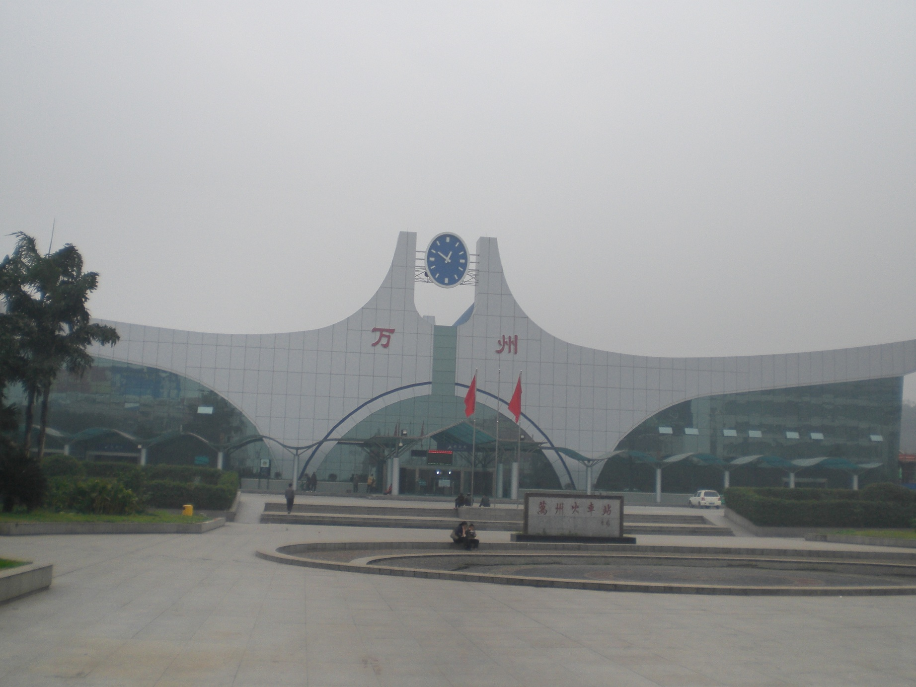 万州火车站